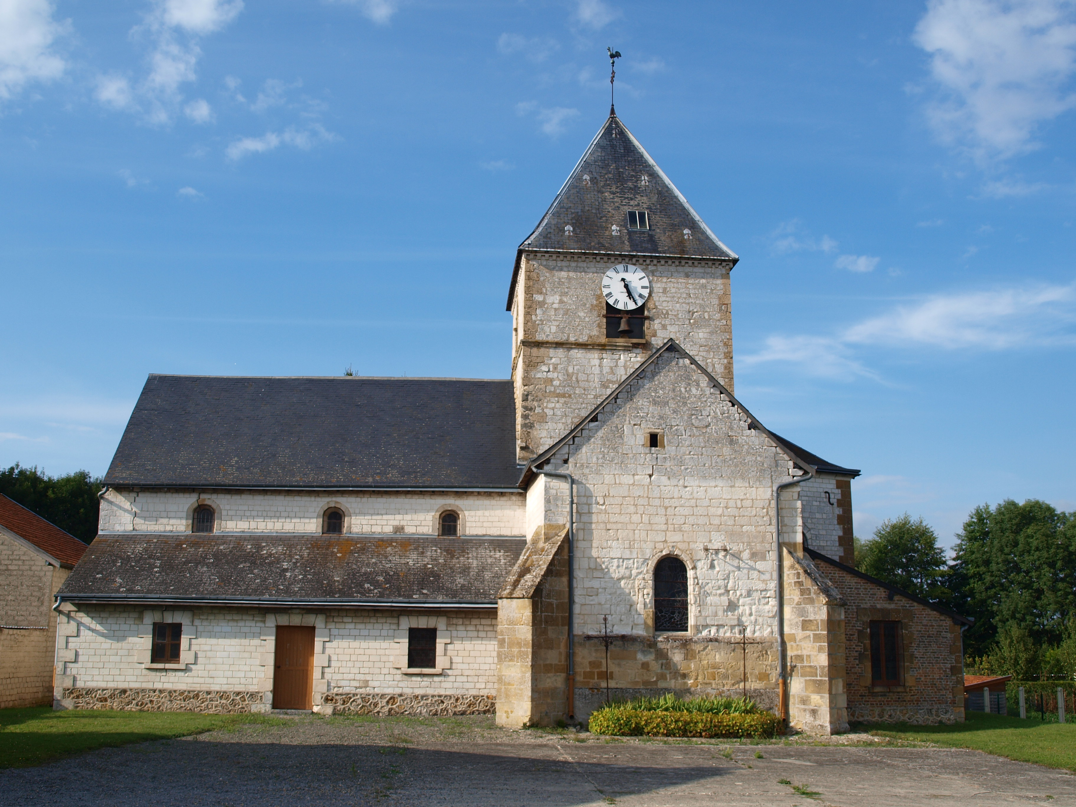 Saint-Clément-à-Arnes (Ardennes, France) ; église